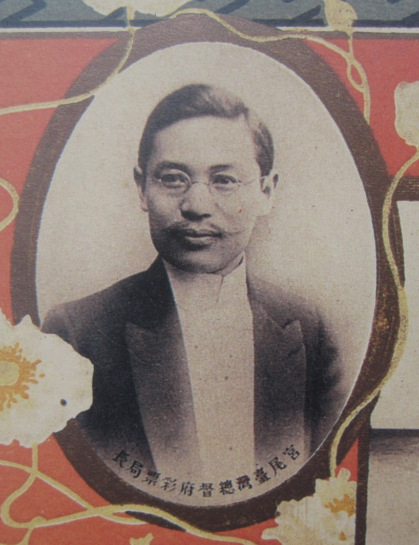 宮尾舜治，臺灣總督府唯一一任彩票局長曁第6任臺灣總督府總務長官